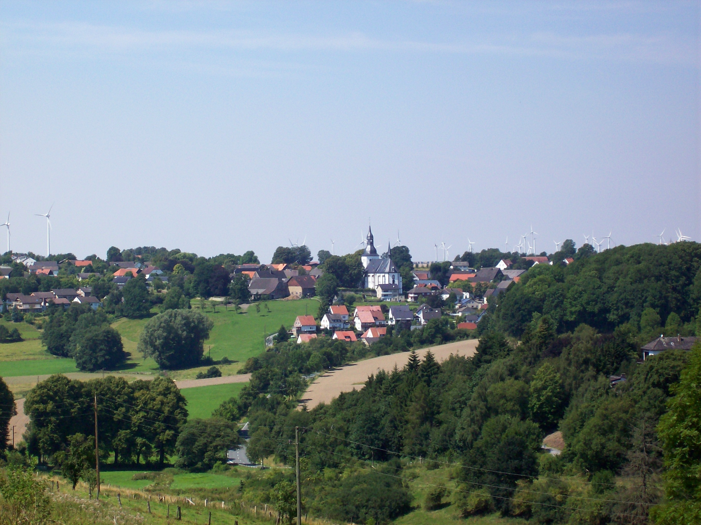 Altenrüthen (Germany)